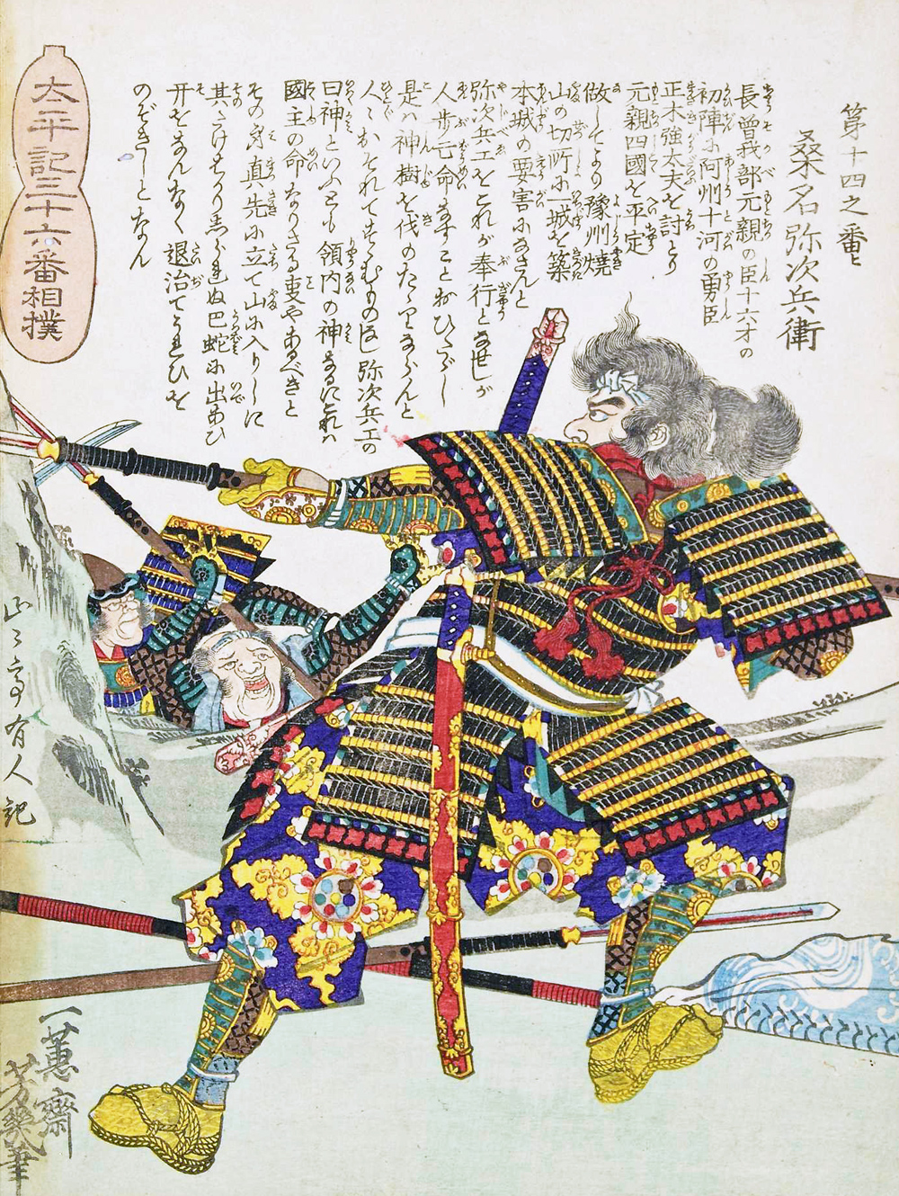 「太平記三十六番相撲第十四之番ヒ：桑名弥次兵衛」